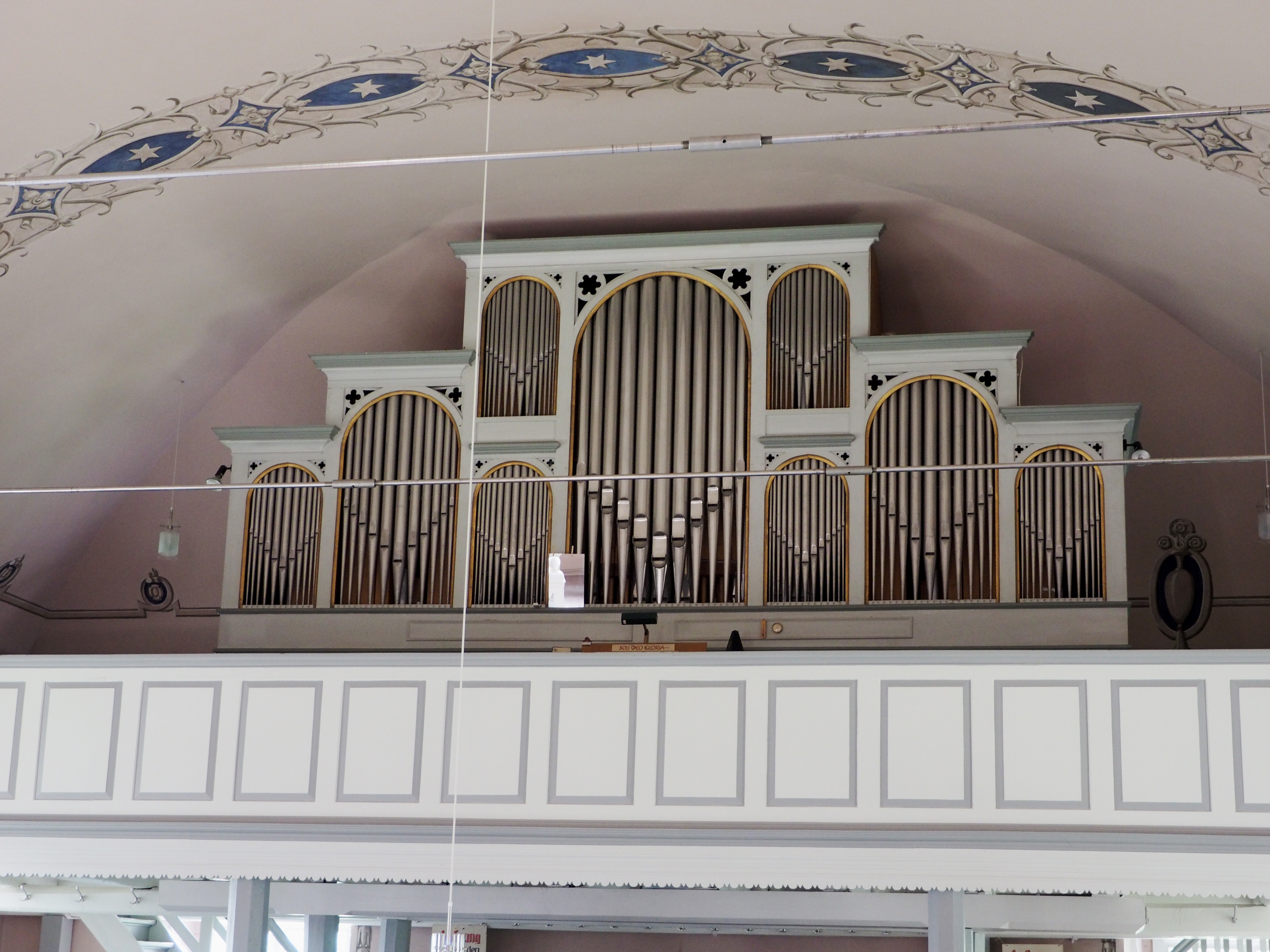 Wetzel-Orgel (Prospekt von Philipp Furtwängler) in der Martinskirche in Beedenbostel, Niedersachsen